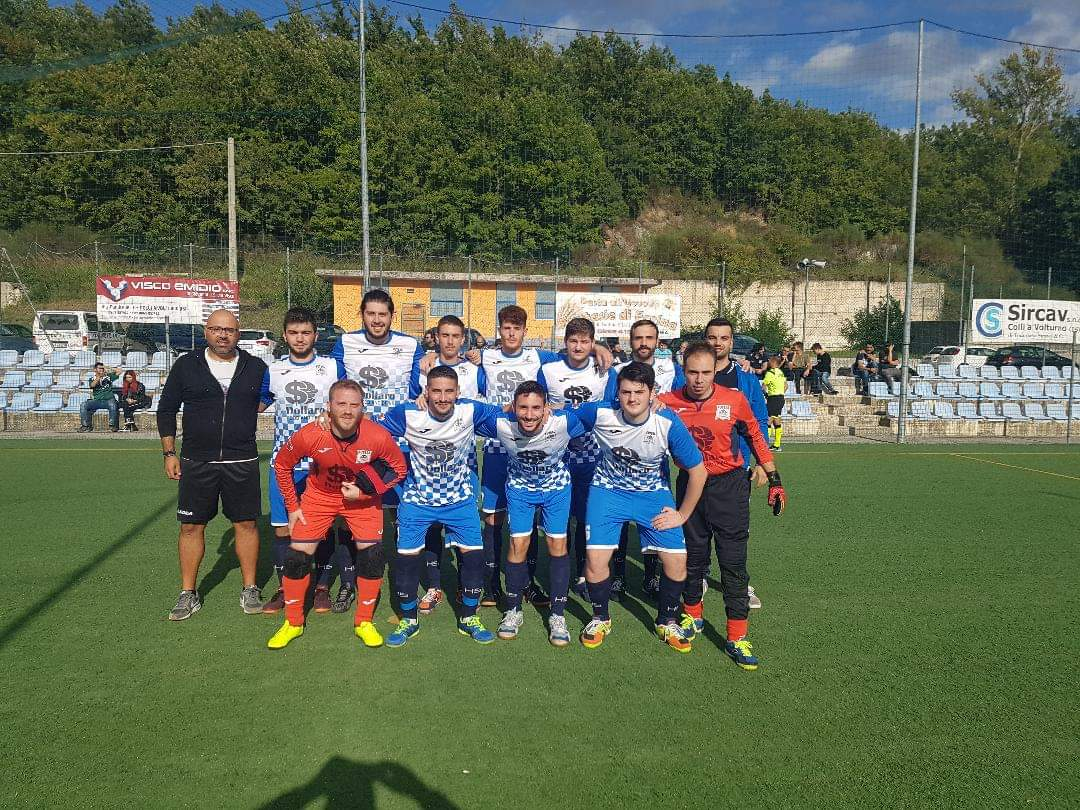 Futsal Colli a Volturno